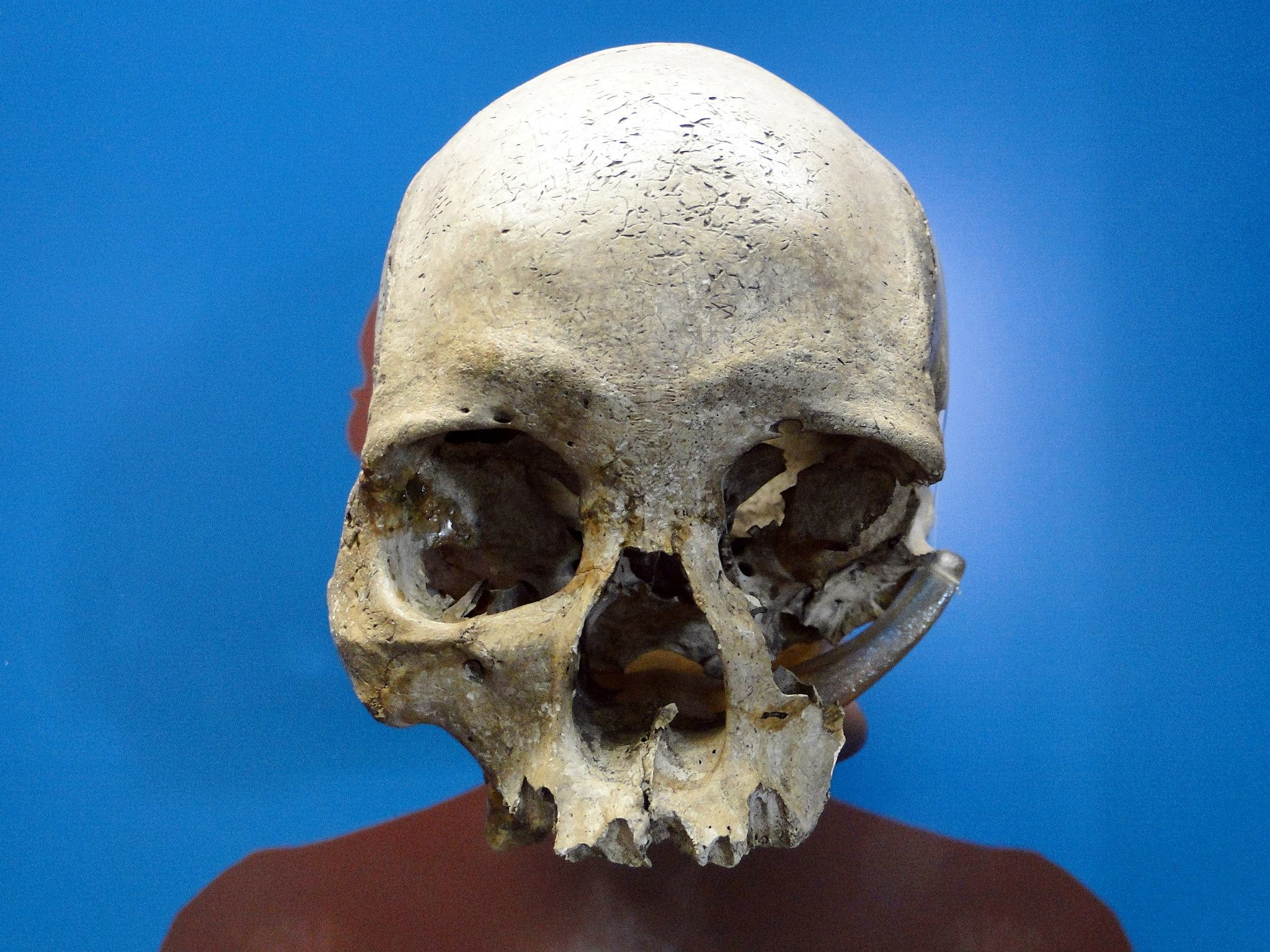 O crânio e ossos da coxa e da bacia de Luzia foram achados em 1975, no Município de Pedro Leopoldo, Minas Gerais. Seu esqueleto foi datado de 11,5 mil anos atrás e ela deve ter morrido aos 25 anos. Neste século, seu rosto foi reconstituído na Inglaterra. Trata-se do esqueleto humano mais antigo encontrado no Brasil. (Texto exibido na exposição).